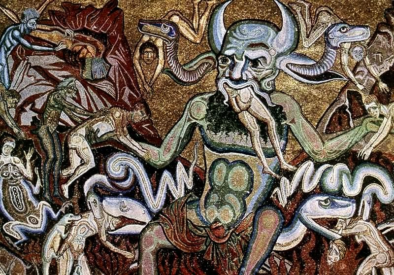 Inferno Canto 34